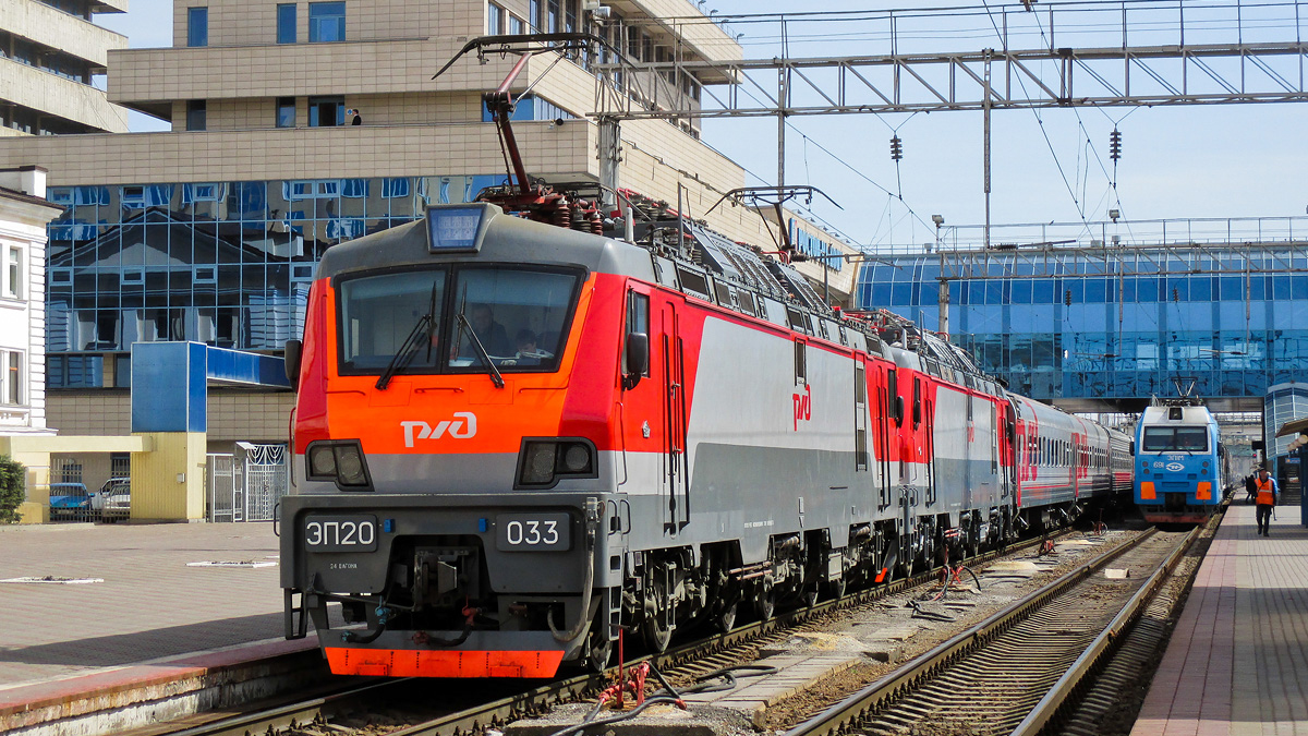 Электровоз ЭП20-033 с фирменным поездом «Ростов-на-Дону — Москва» на станции Ростов-Главный